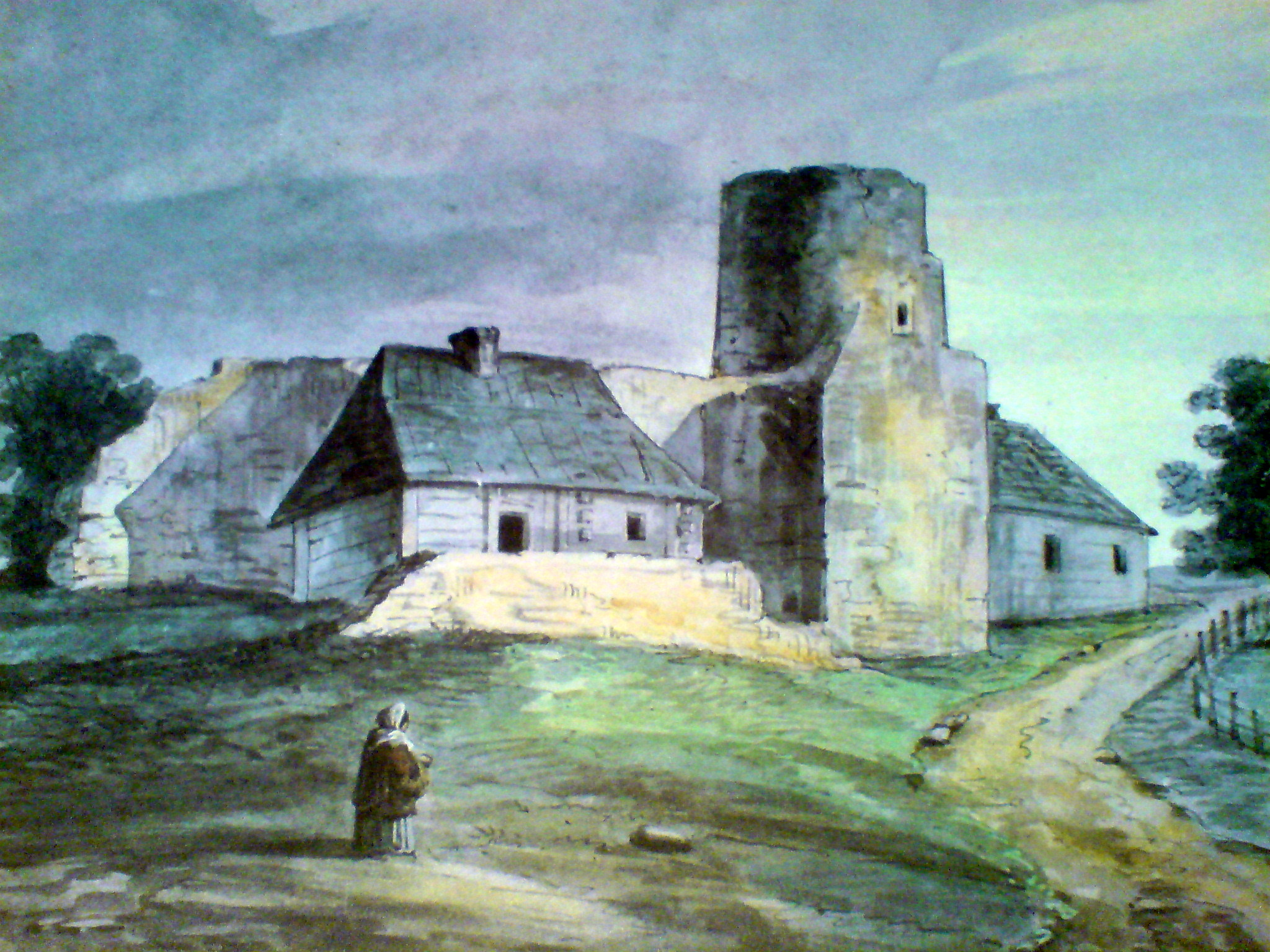 Bodzentyn. Mur miejski i baszta w południowej części obwodu od strony zewnętrznej, narysowane przez Kazimierza Stronczyńskiego w poł. XIX wieku.